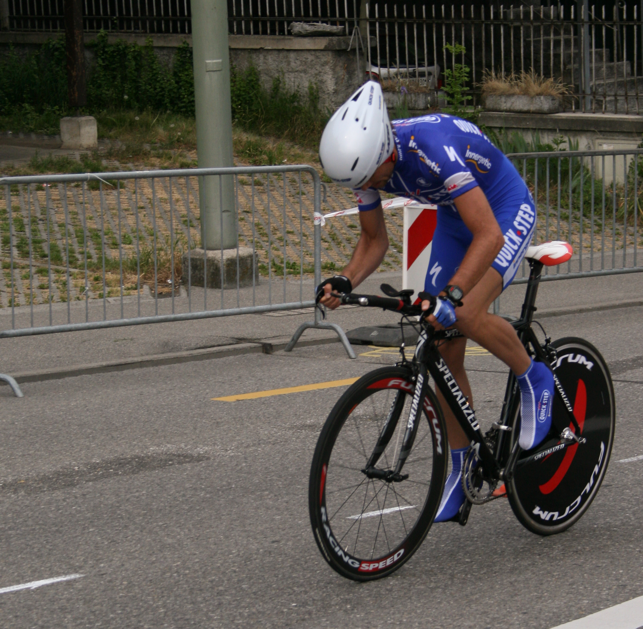 Addy Engels prologue du Tour de Romandie 2007